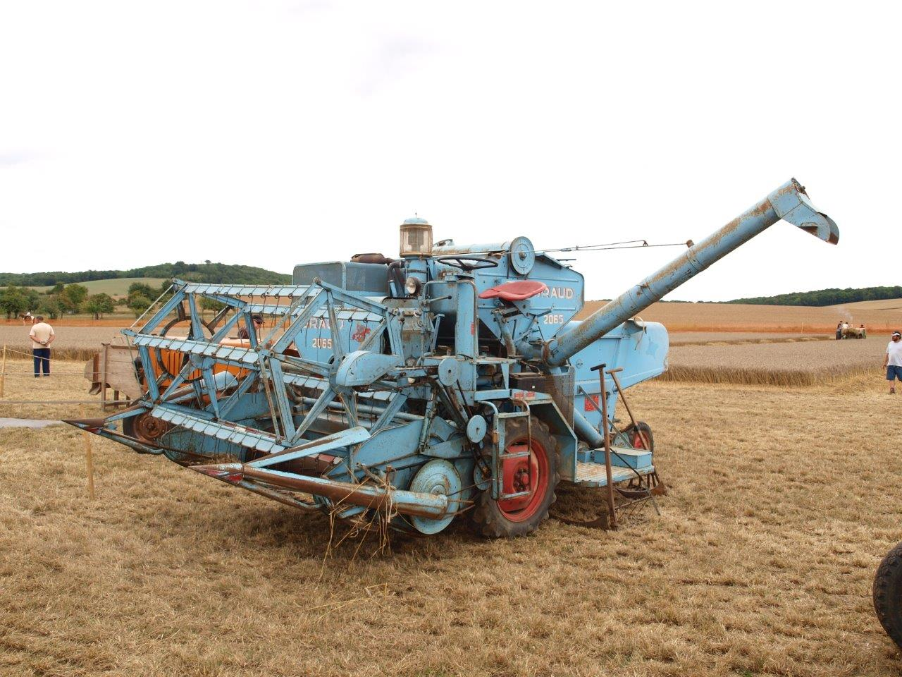 Véron (Yonne, France) ; lors de la fête agricole 2013